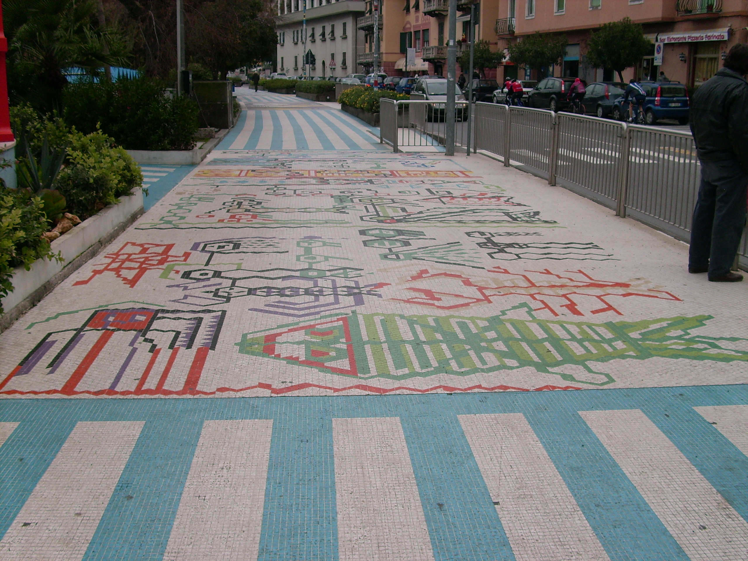 Lungomare degli Artisti di Albissola Marina, Liguria, Italy